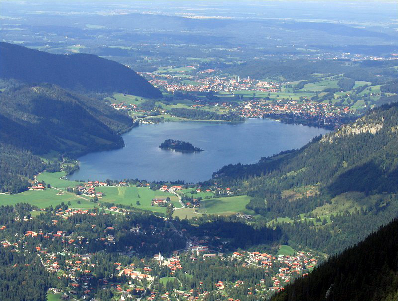 Schliersee vom Jägerkamp gesehen